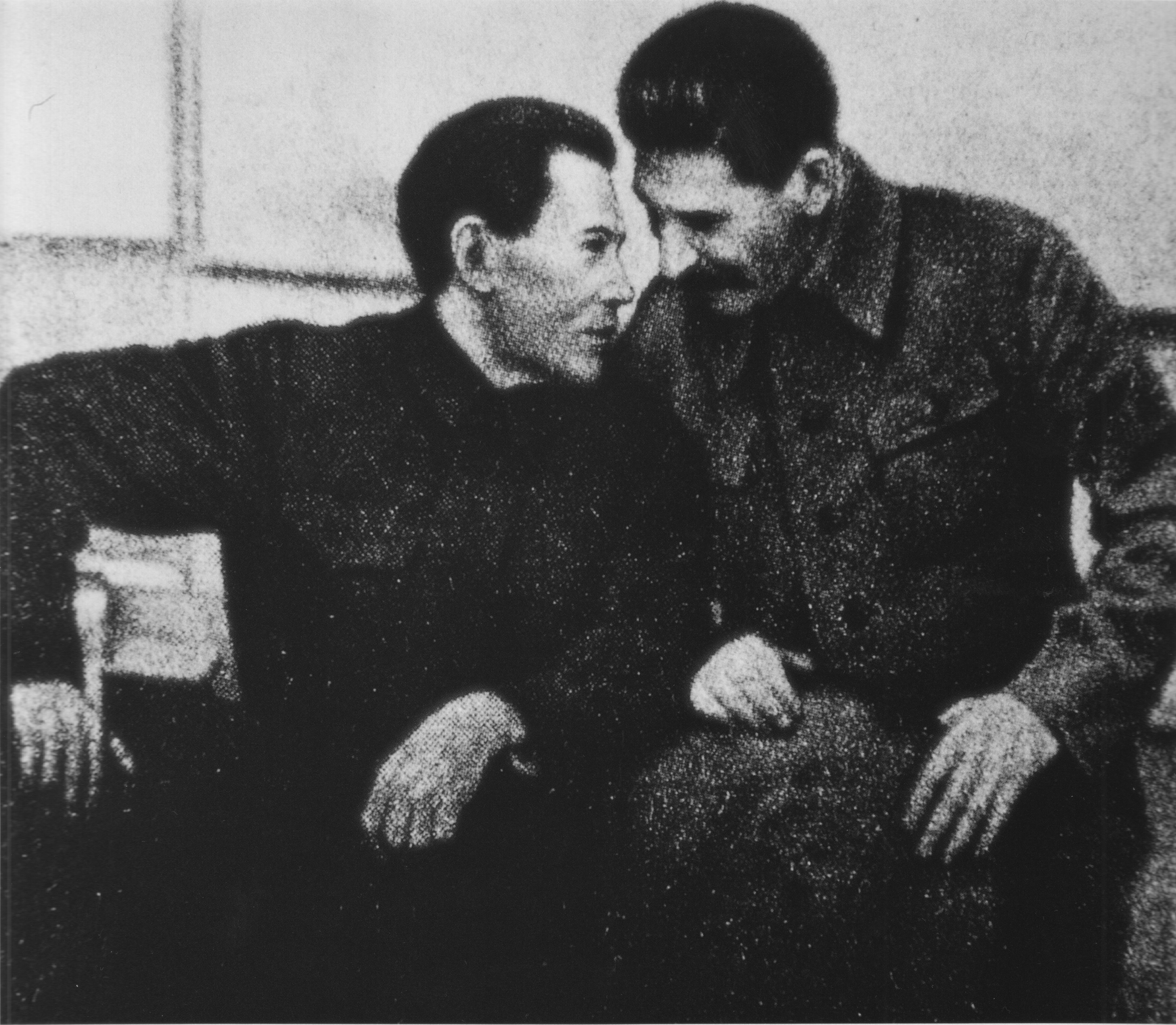 Stalin y Yezhov en el vigésimo aniversario de la cheka, en Moscú, el 20 de diciembre de 1937